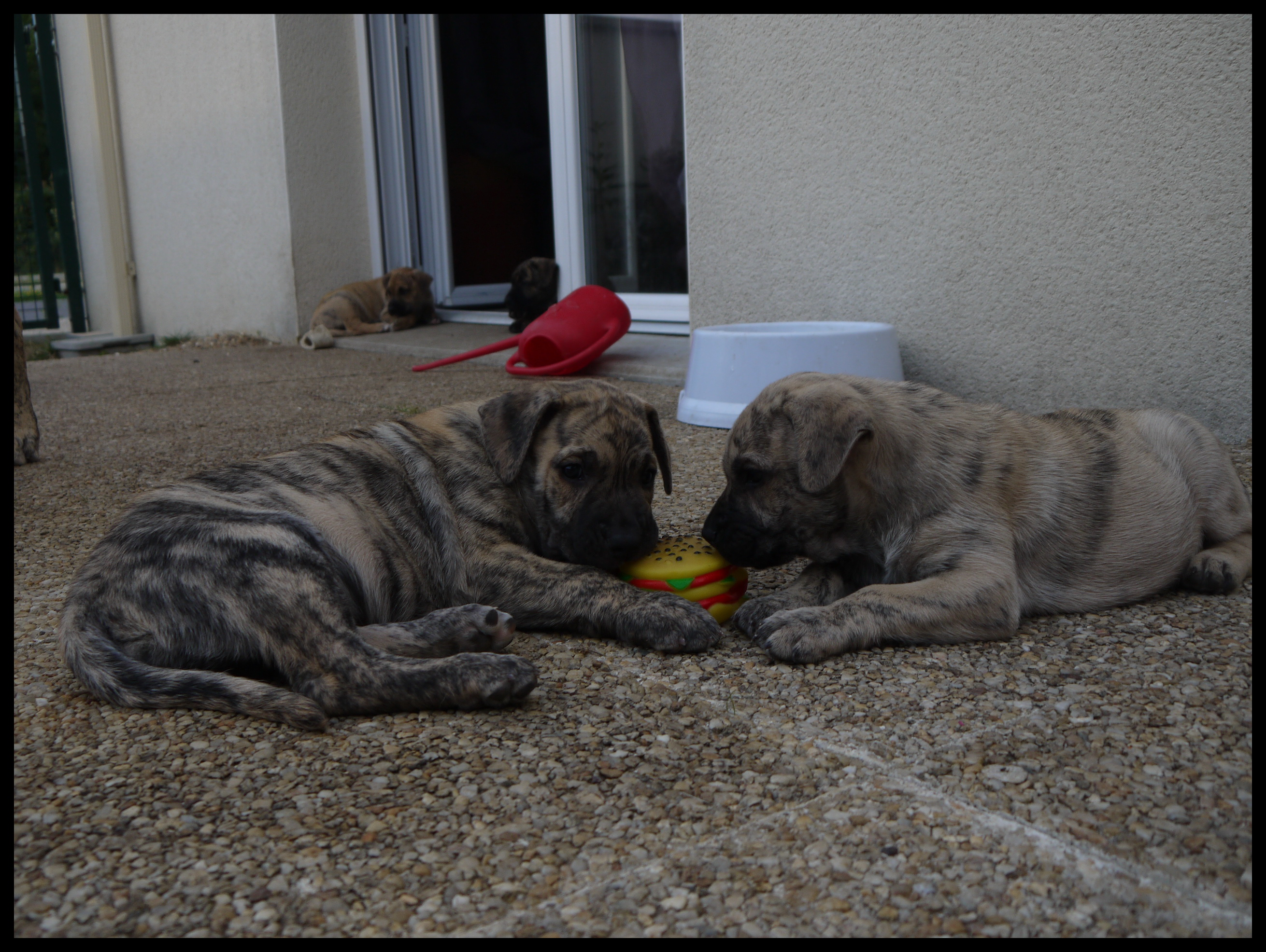 Cimarron Uruguayen en France